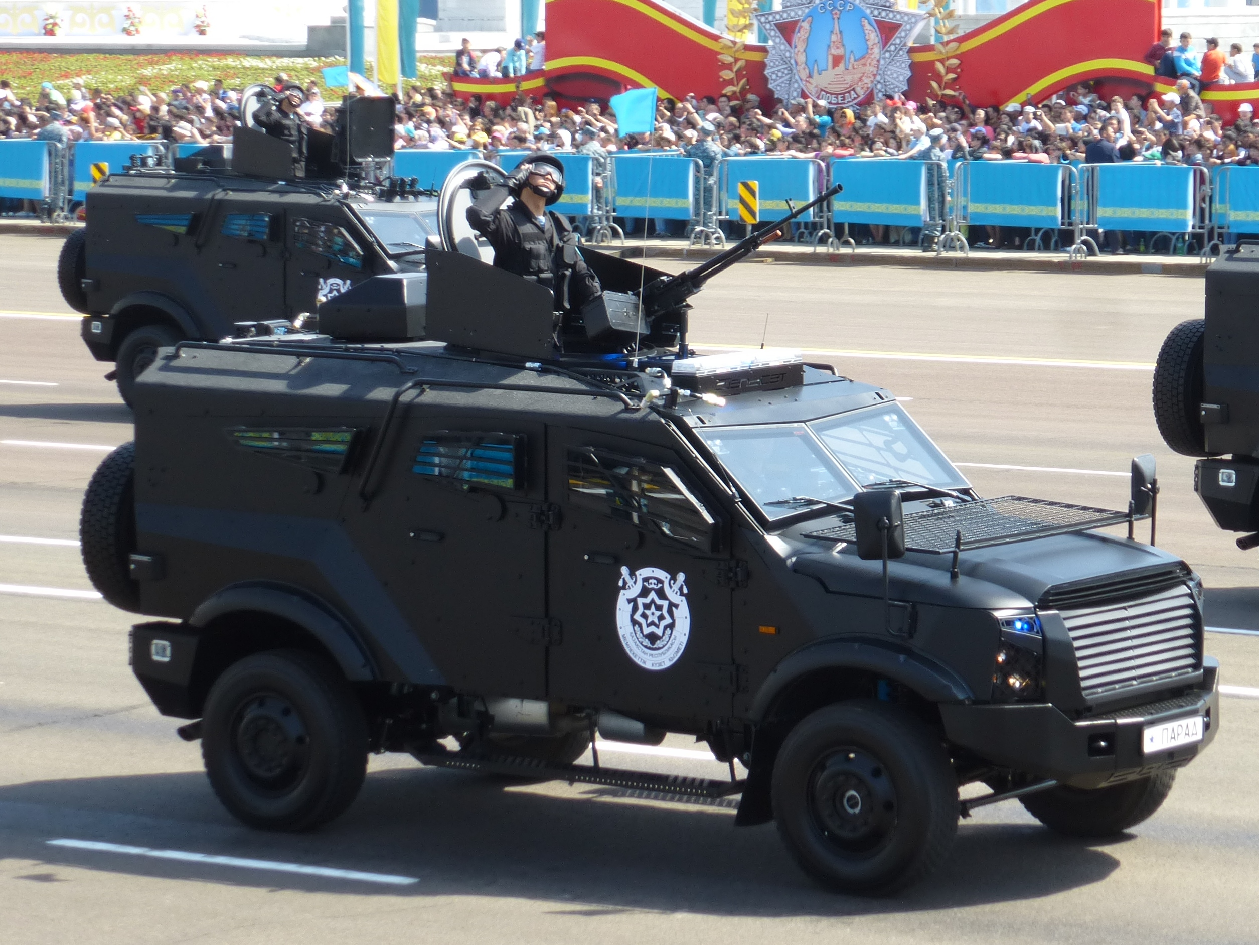 Бронеразведывательная машина SandCat на военном параде в Нур-Султан 7 мая 2015 года